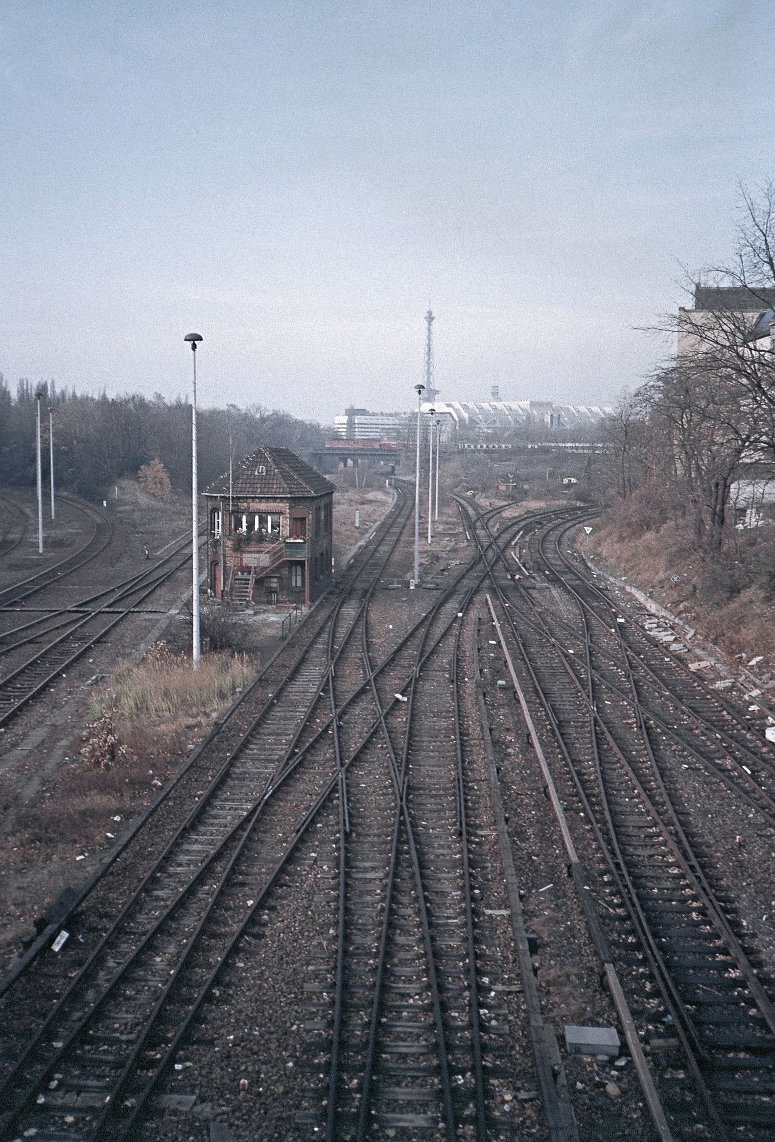 Halensee Abzweig Südringkurve